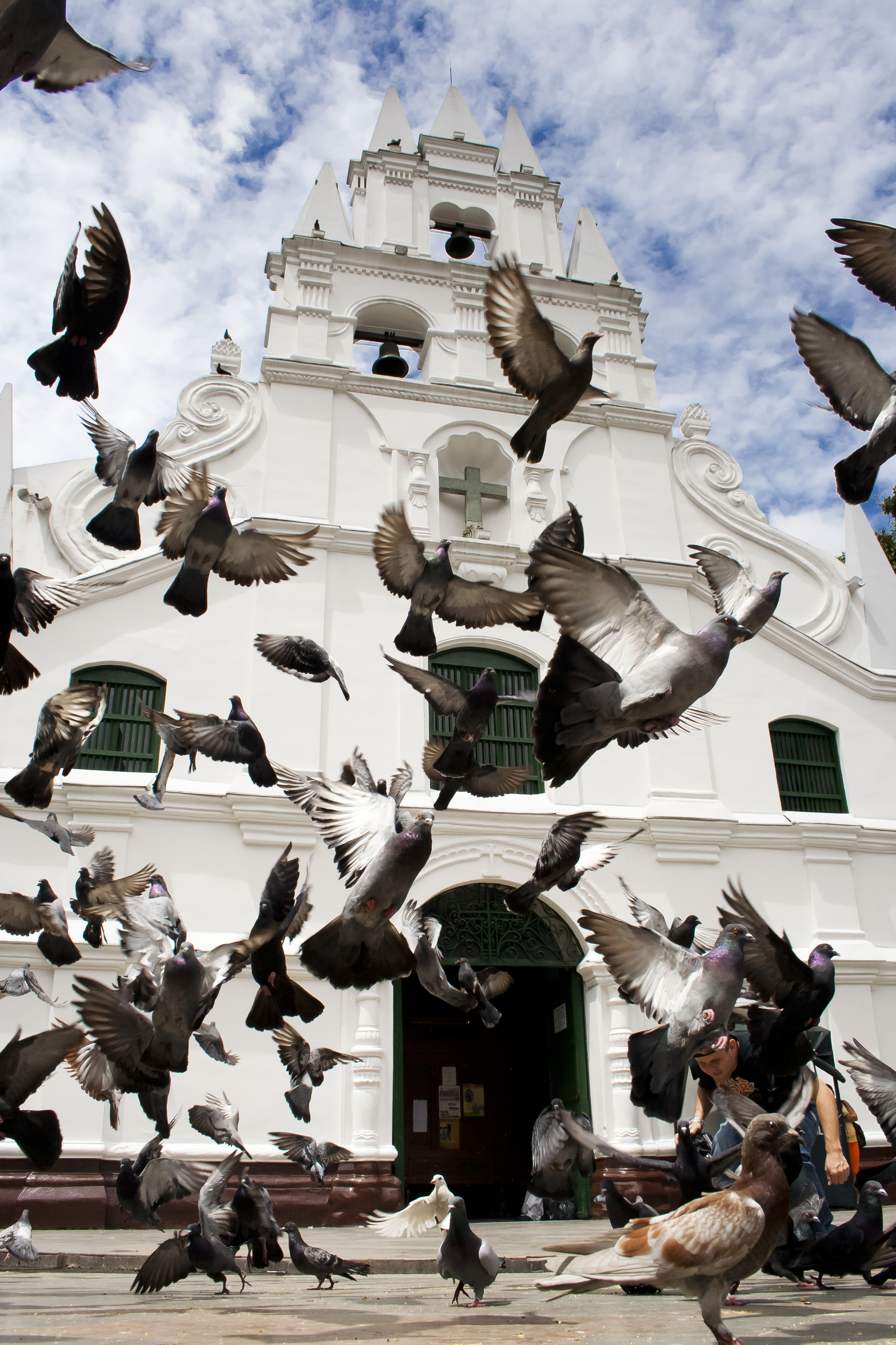 las palomas adornan el antiguo templo de la Veracruz en el centro de Medellín